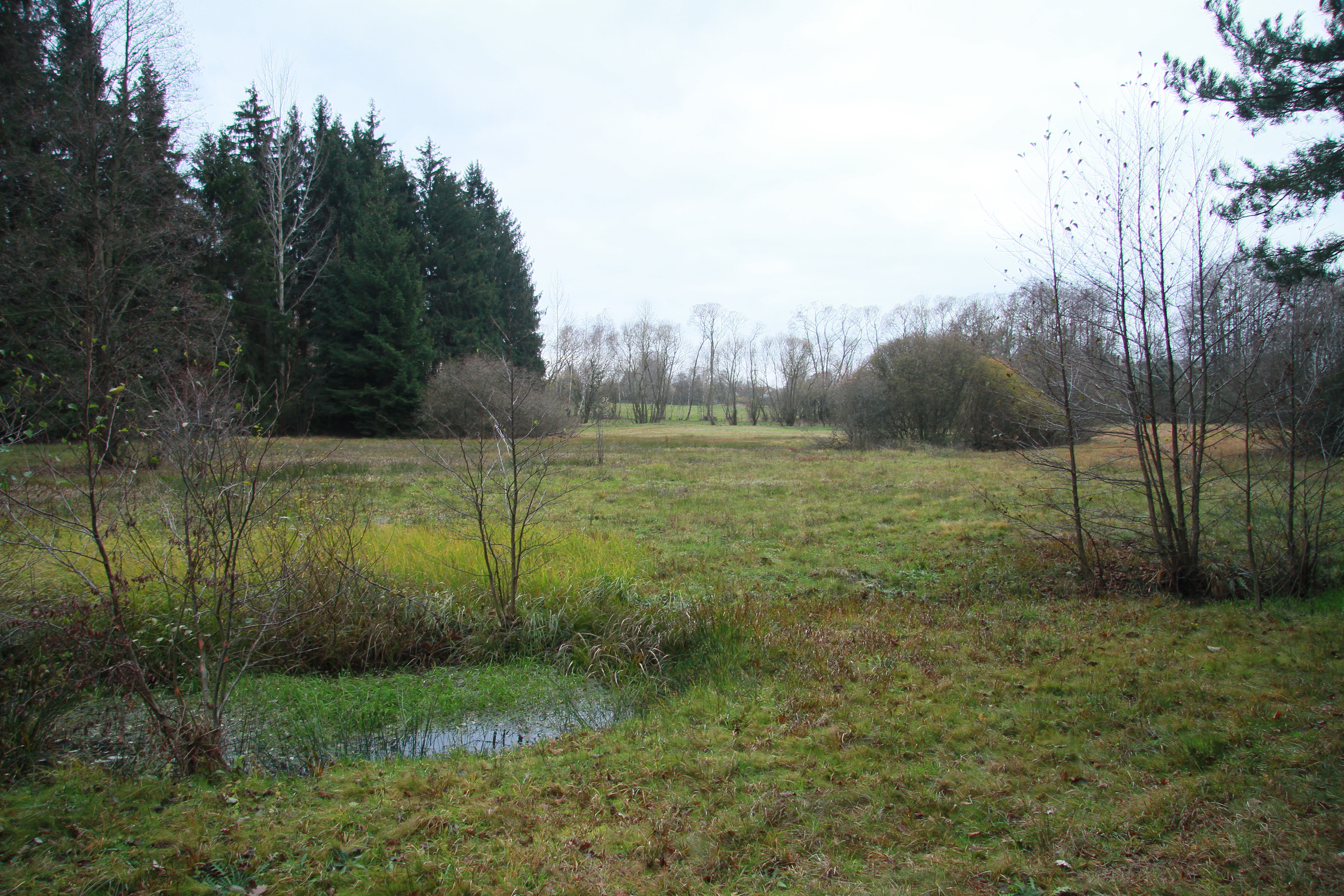 Podlesí 6